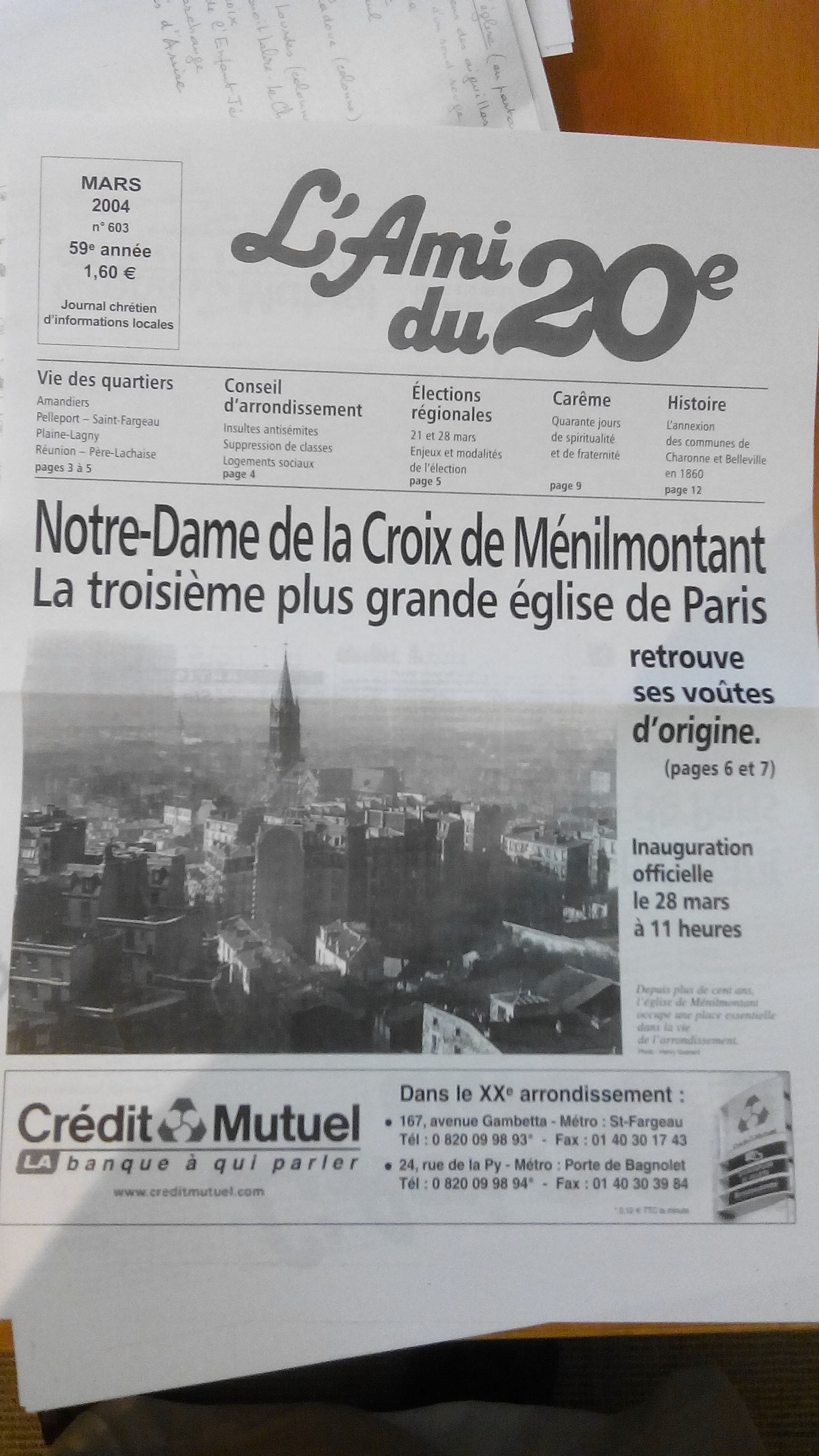 Notre Dame de la Croix de Ménilmontant est la 3e plus grande église de Paris. Le journal "l'Ami du 20e" nous le montre (journal de mars 2004)